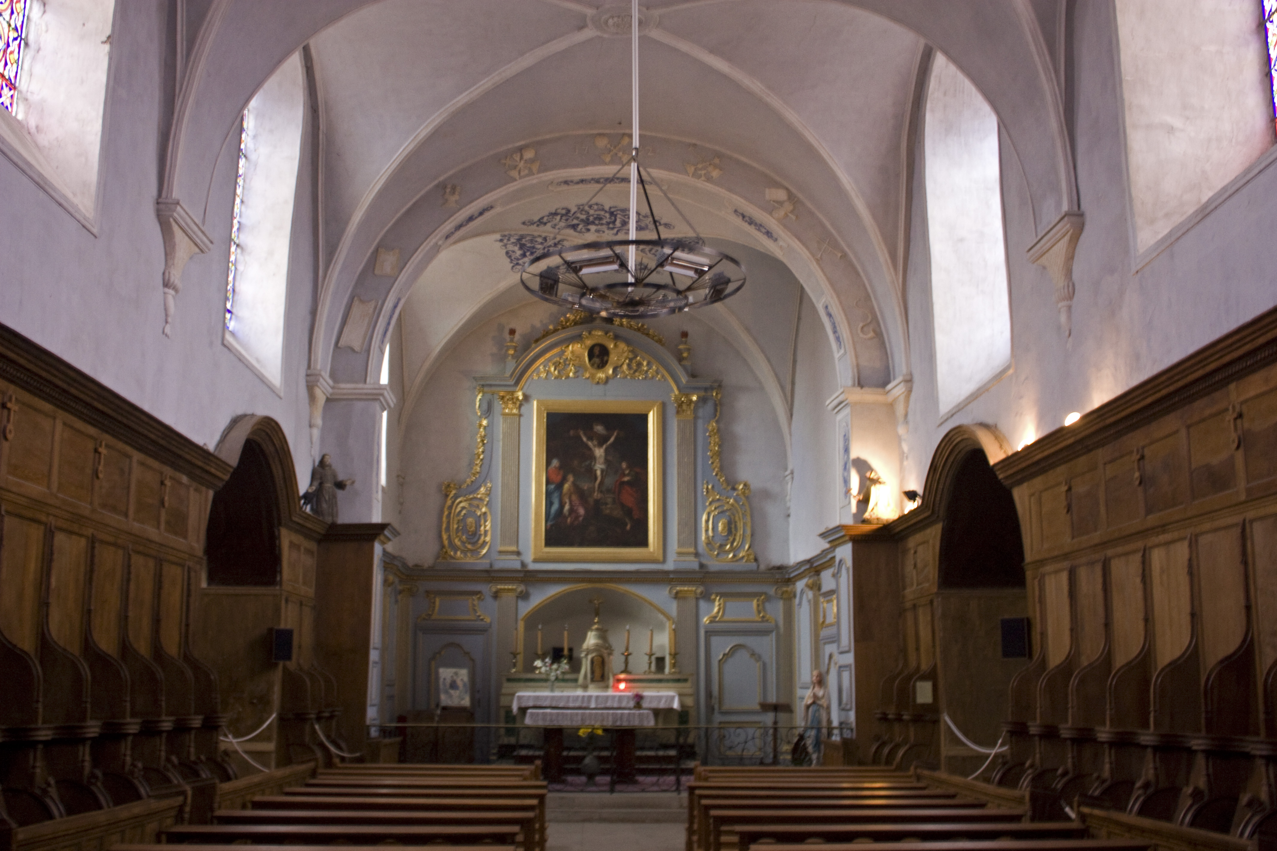 Vue générale de la nef.